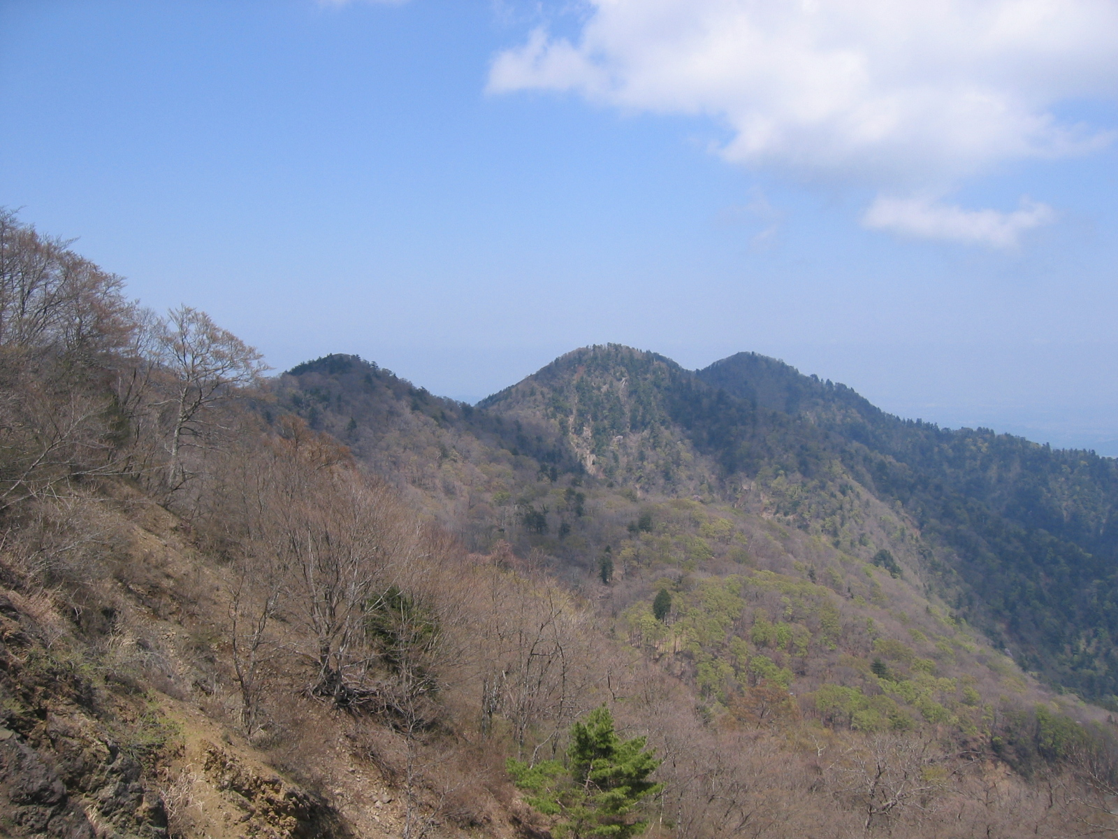 天王寺尾根から望む丹沢三峰